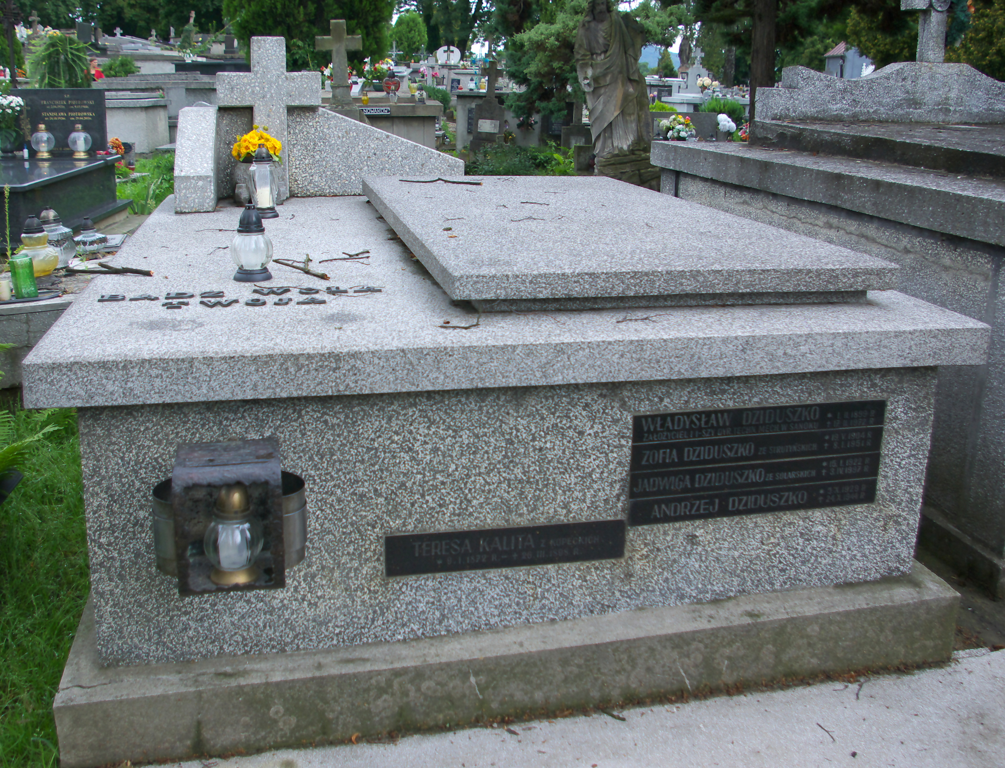 Grobowiec rodziny Dziduszko na Cmentarzu Centralnym w Sanoku.